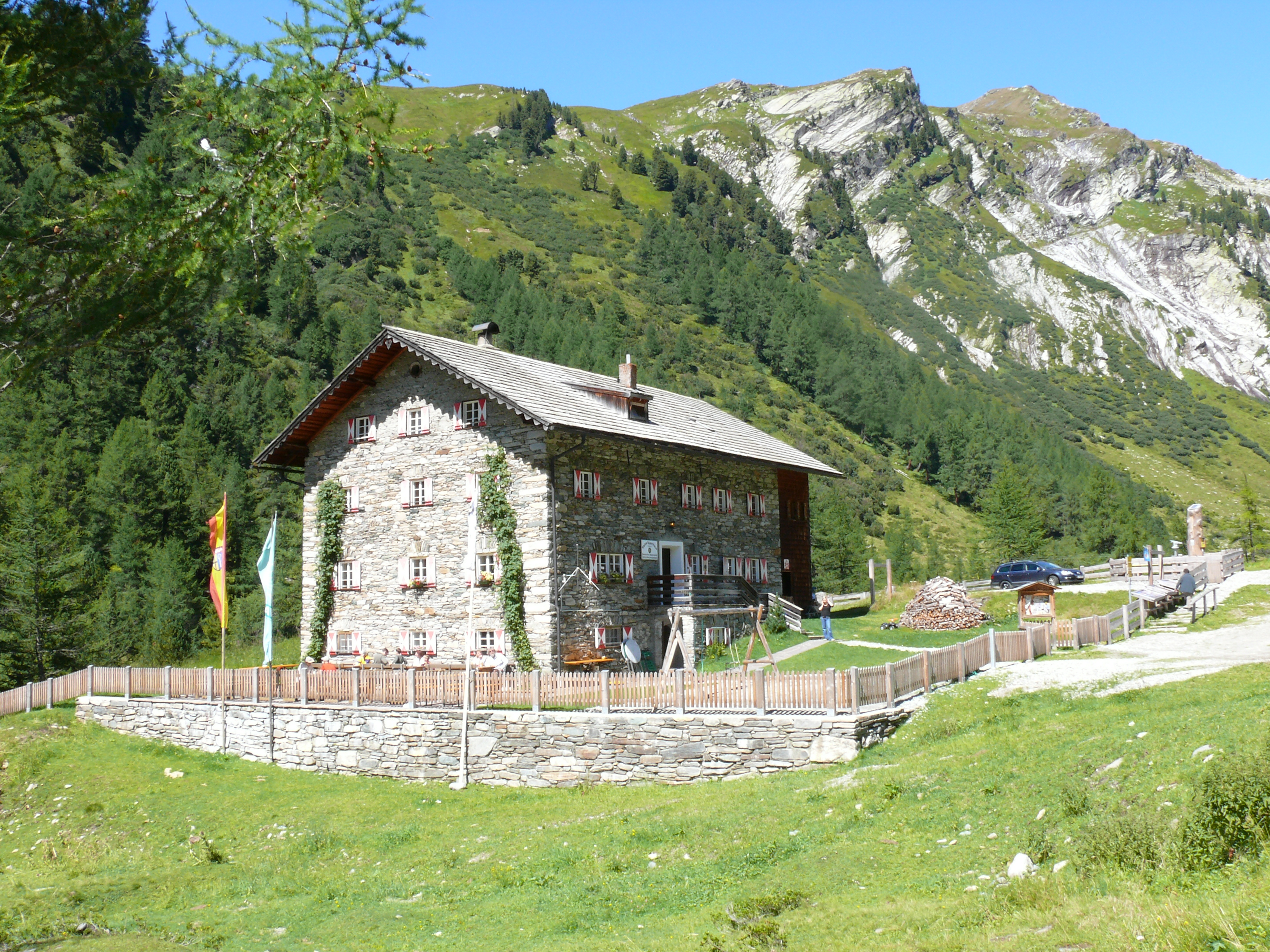 Kalser Tauernhaus (1755 m) im Kalser Dorfertal, Osttirol)